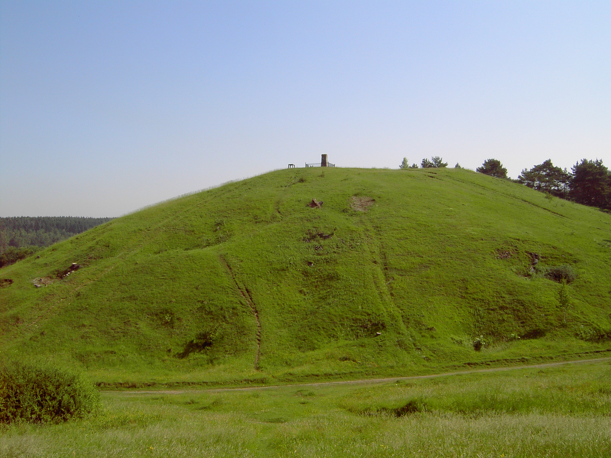 Schlangenberg im Monat Juni